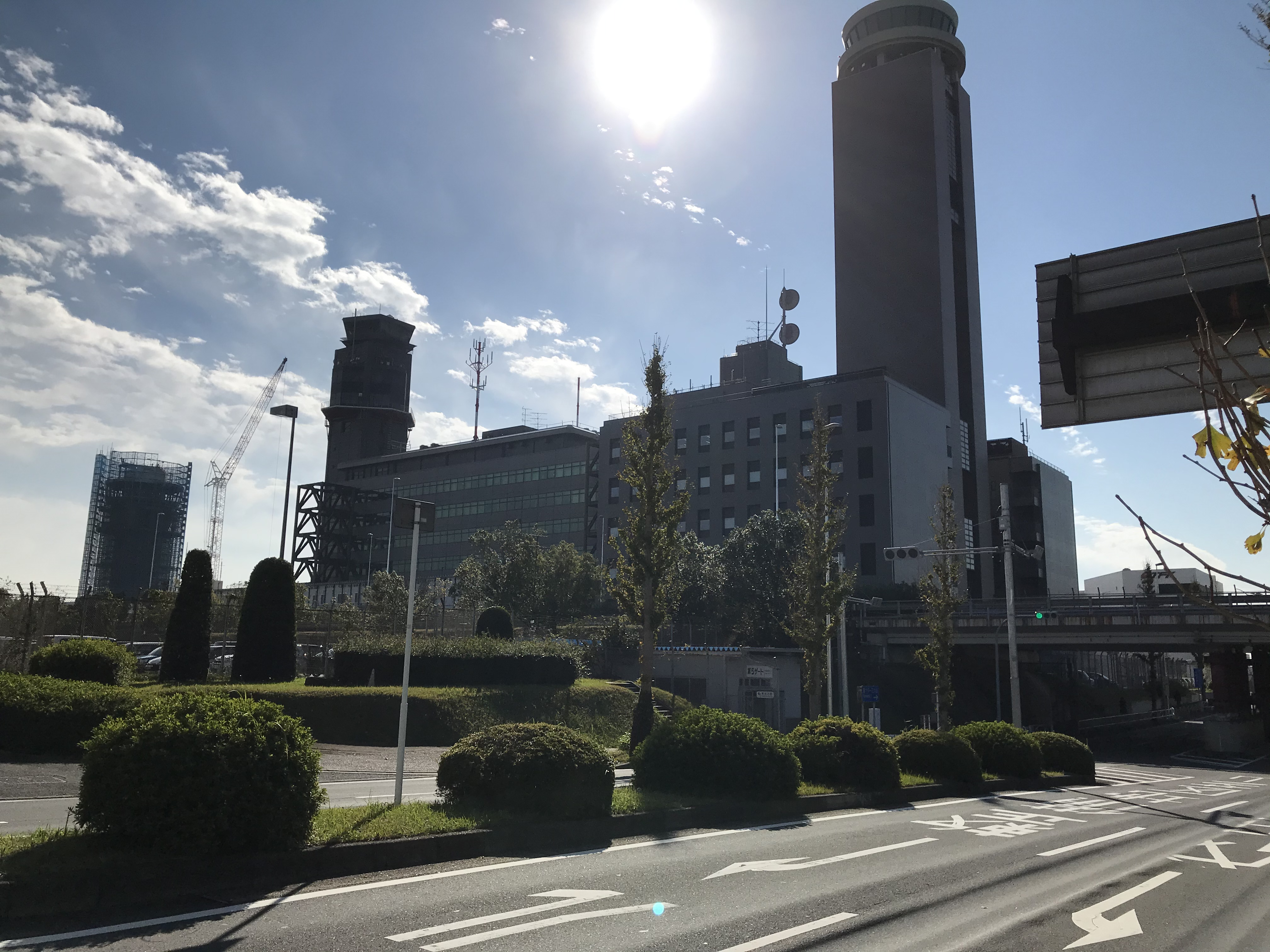 建設中の新ランプタワーと東成田駅出口（2019年）